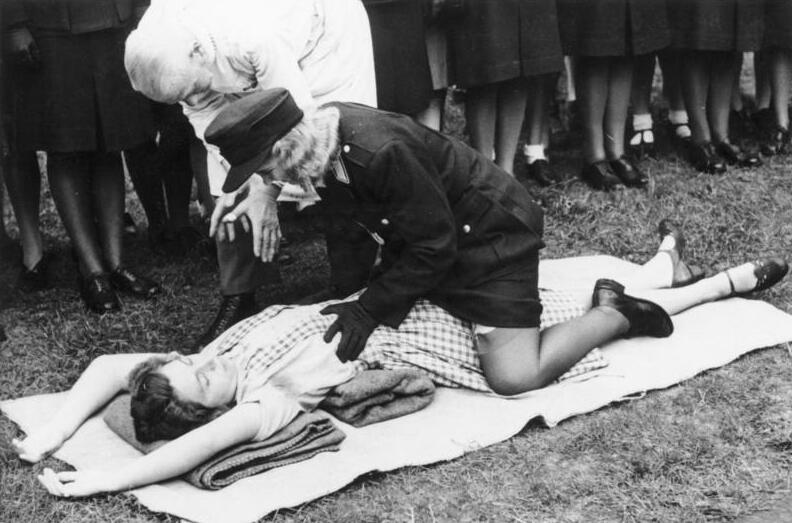 Illus/ E.O. Krueger Weibliche uniformierte Polizei in der Ausbildung bei Wiederbelebungsversuchen 298-46 ADN-ZB/E.O:Krueger Berlin 1946: Auch Wiederbelebungsversuche gehören zum Ausbildungsprogramm der künftigen Polizistinnen. 298-26